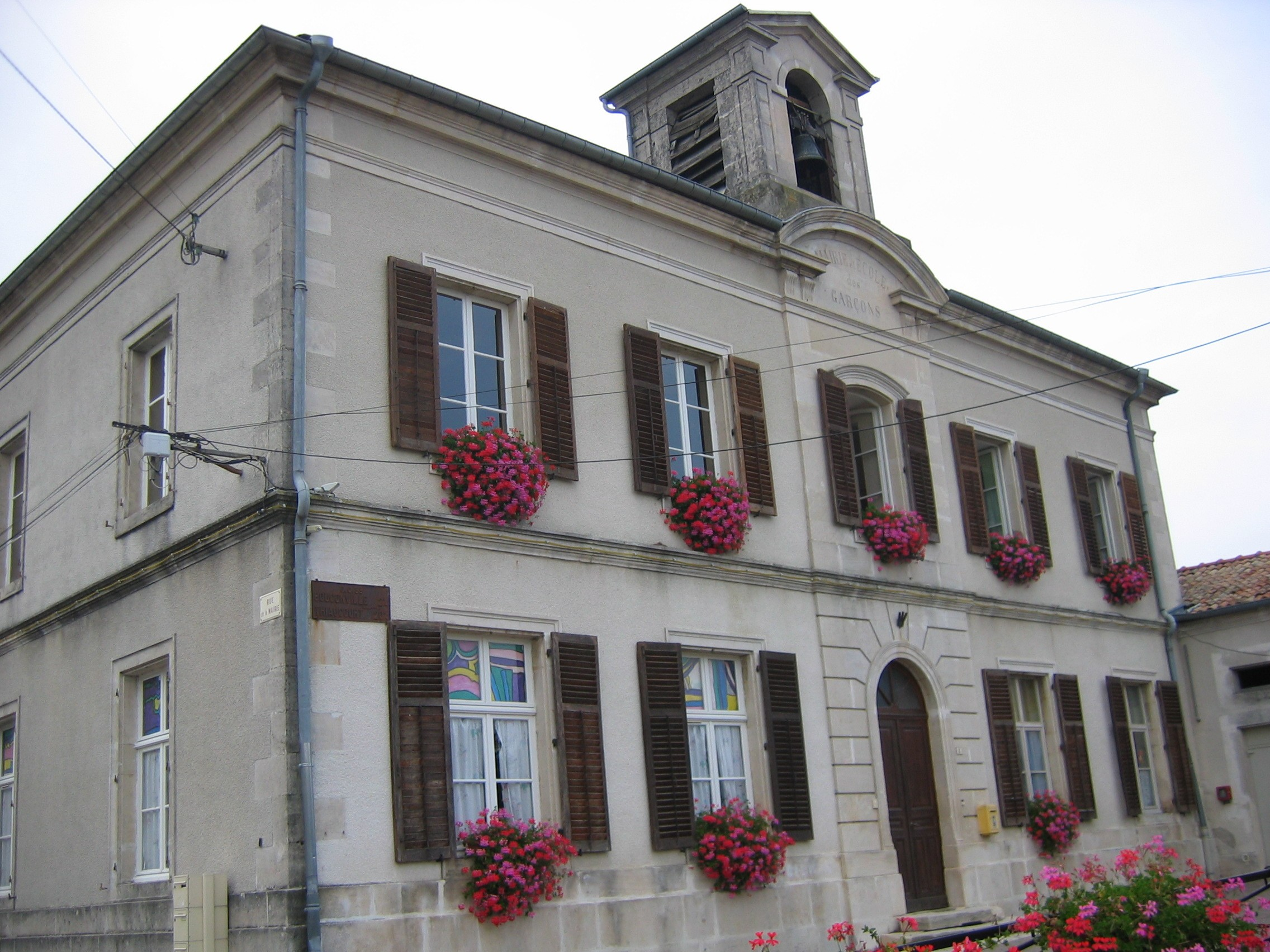 École de Broussey-en-Woëvre